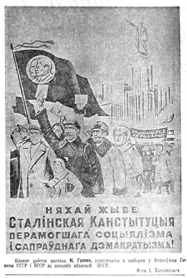 М. І. Гусеў. Плакат, выпушчаны да выбараў у Вярхоўныя Саветы БССР і СССР ад заходніх абласцей Беларусі "Няхай жыве сталінская канстытуцыя перамогшага соцыялізма і сапраўднага дэмакратызма!"